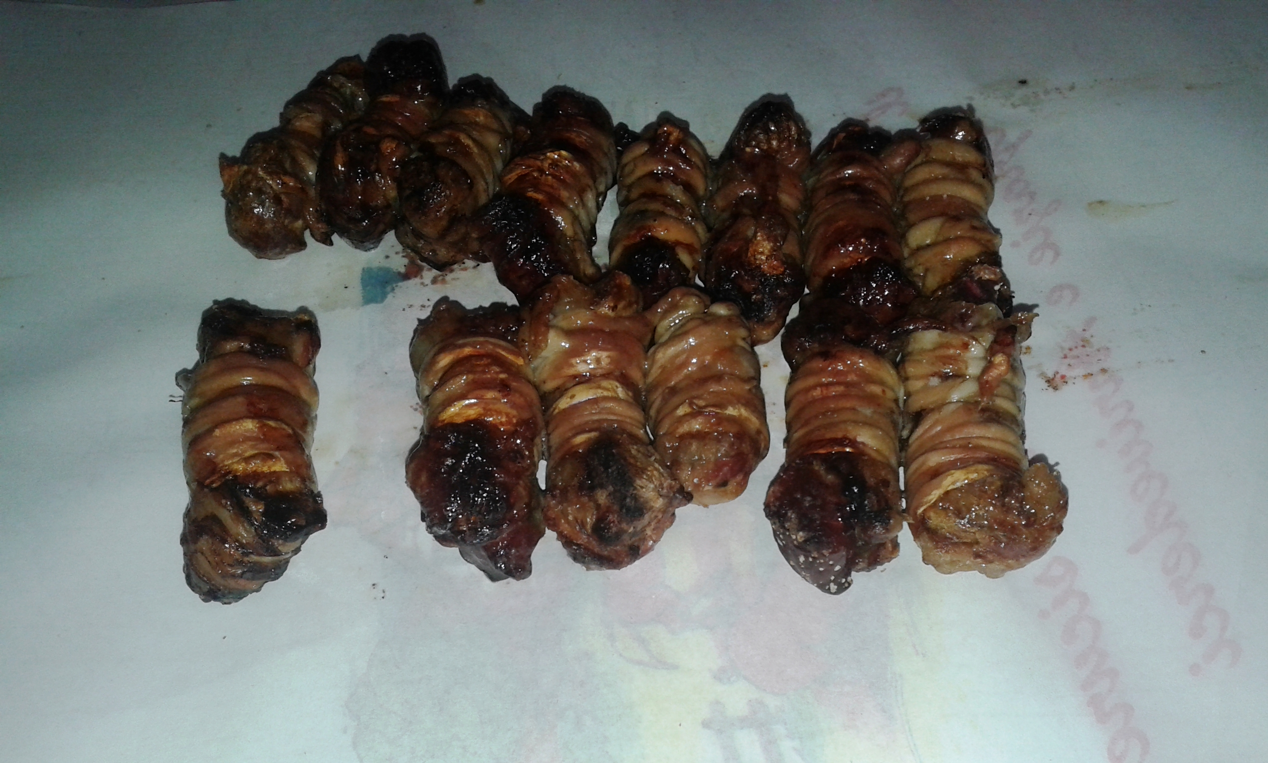 Involtini di interiora